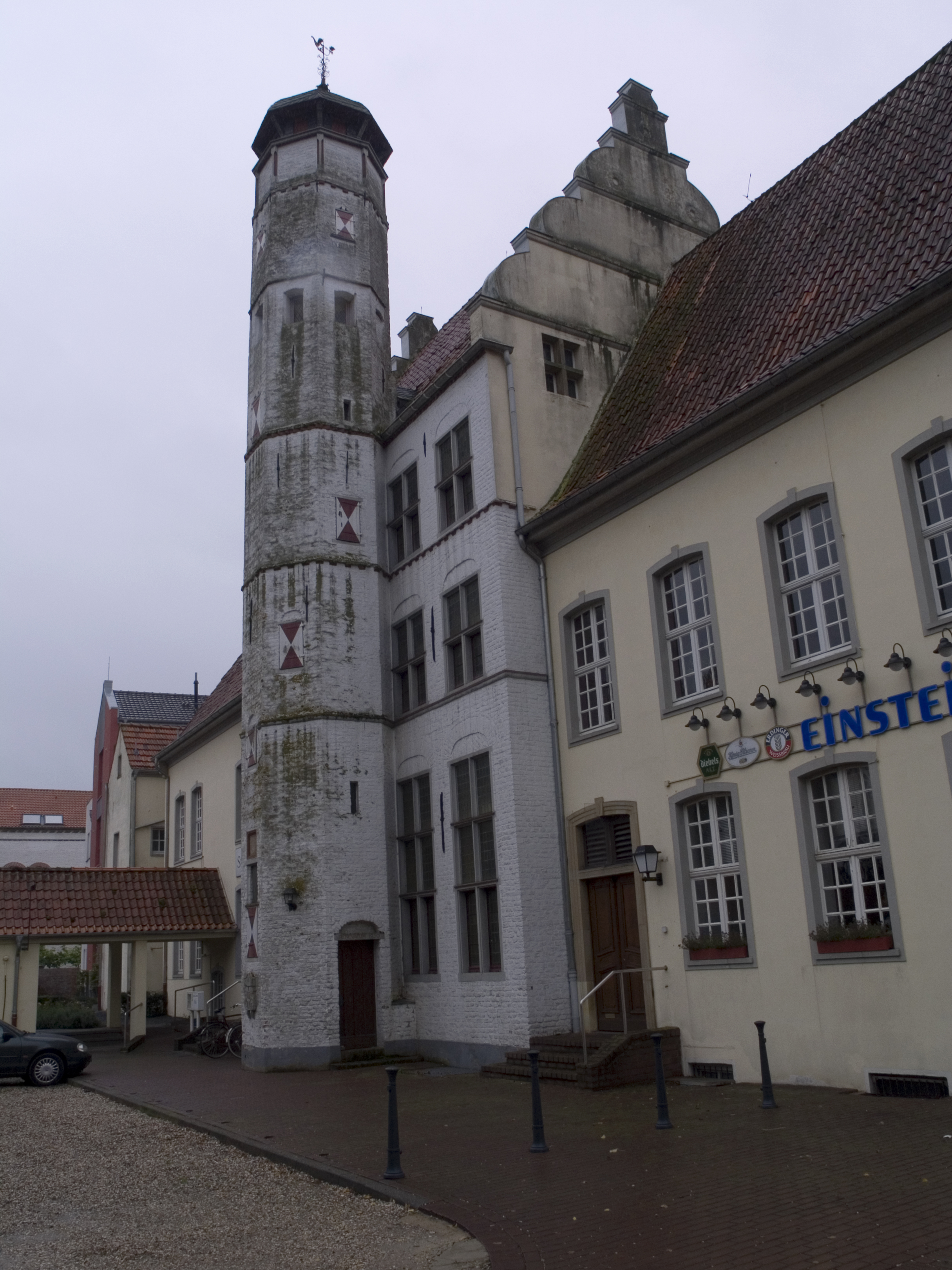 Северный Рейн-Вестфалия, г. Ксантен, старый город - монастырь картезианцев